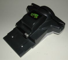 カードeリーダー+ 撮影日:2004/10/28 撮影者:PiaCarrot